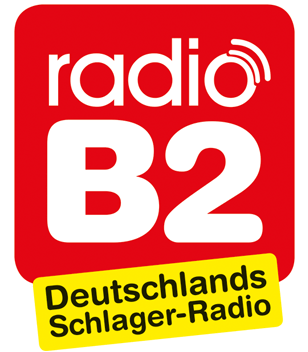 Logo von radioB2 Deutschlands Schlager-Radio